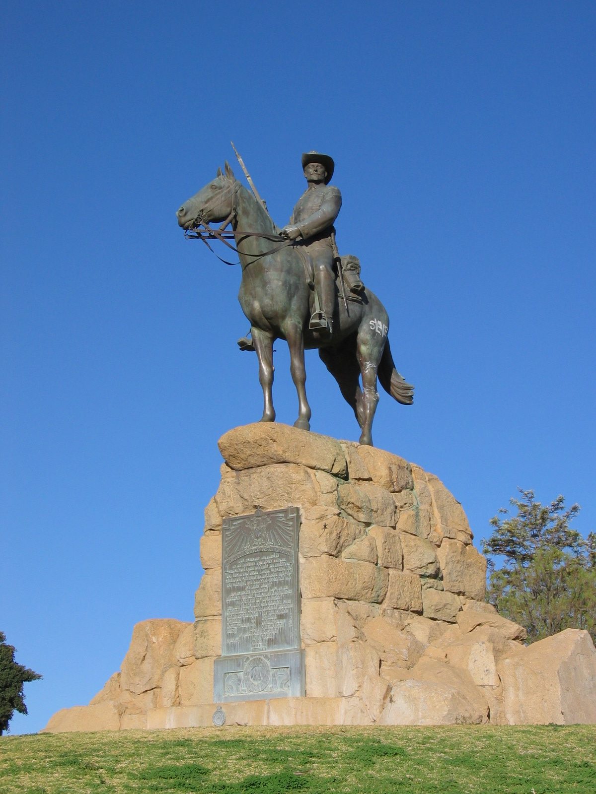 Südwesterdenkmal (Reiterdenkmal), Windhoek, Namibia